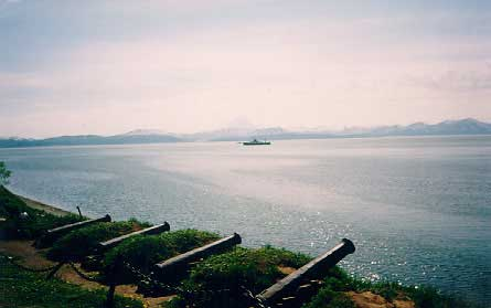 Cannons used in "Petropavlovsk defense" in 1854